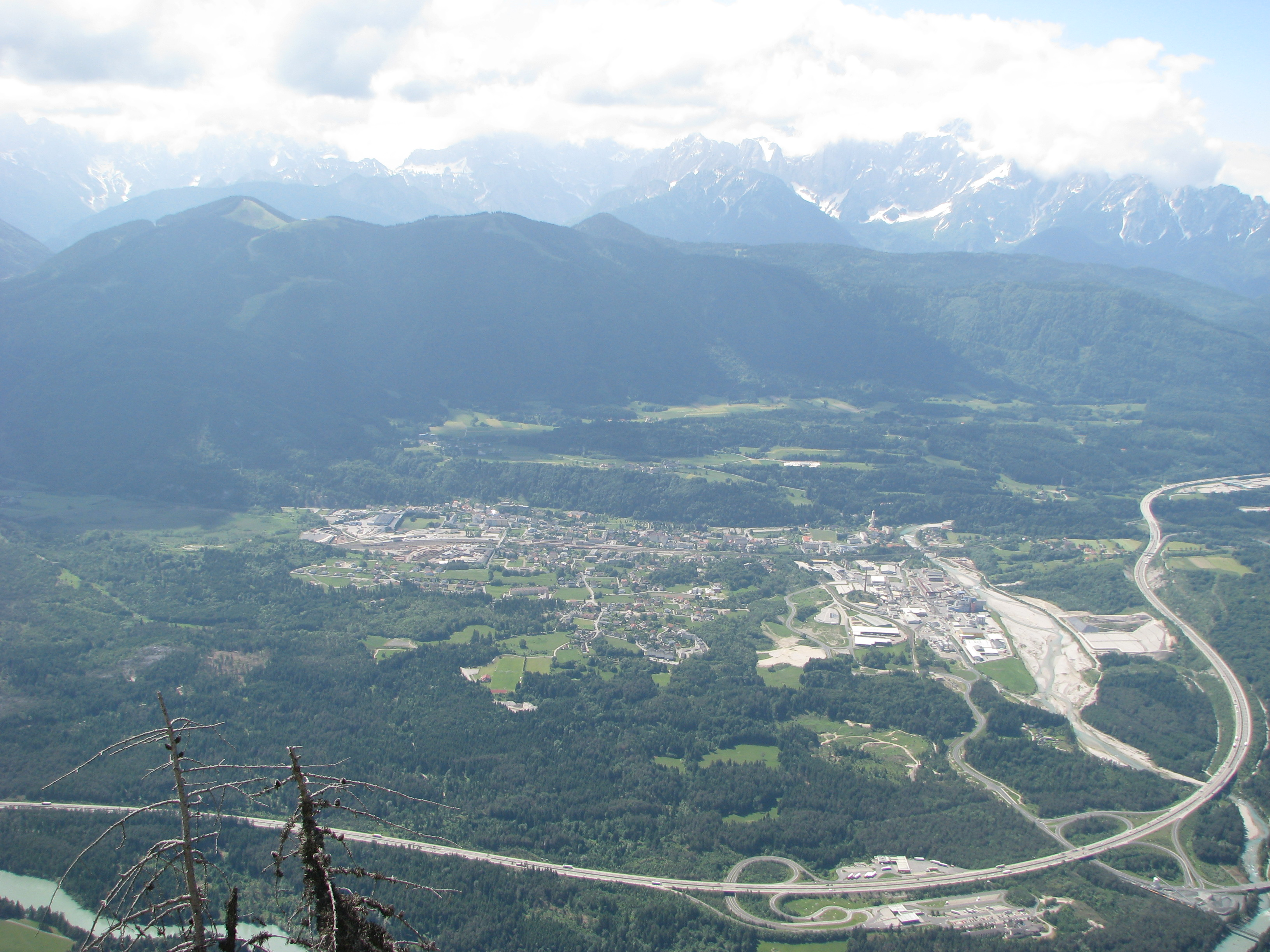 Arnoldstein